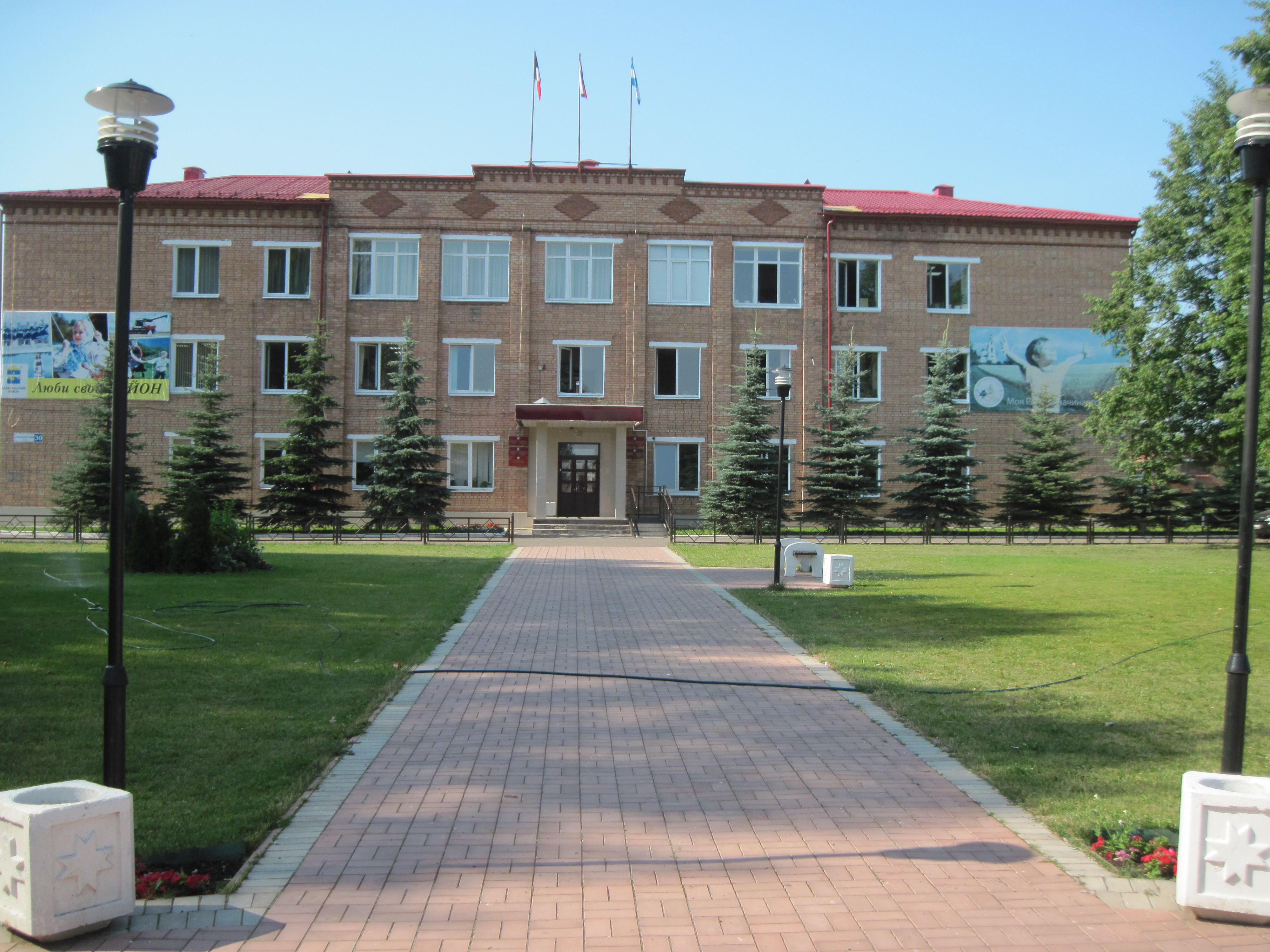 Удмуртская республика,Сарапульский район,село Сигаево,ул.Лермонтова,30.